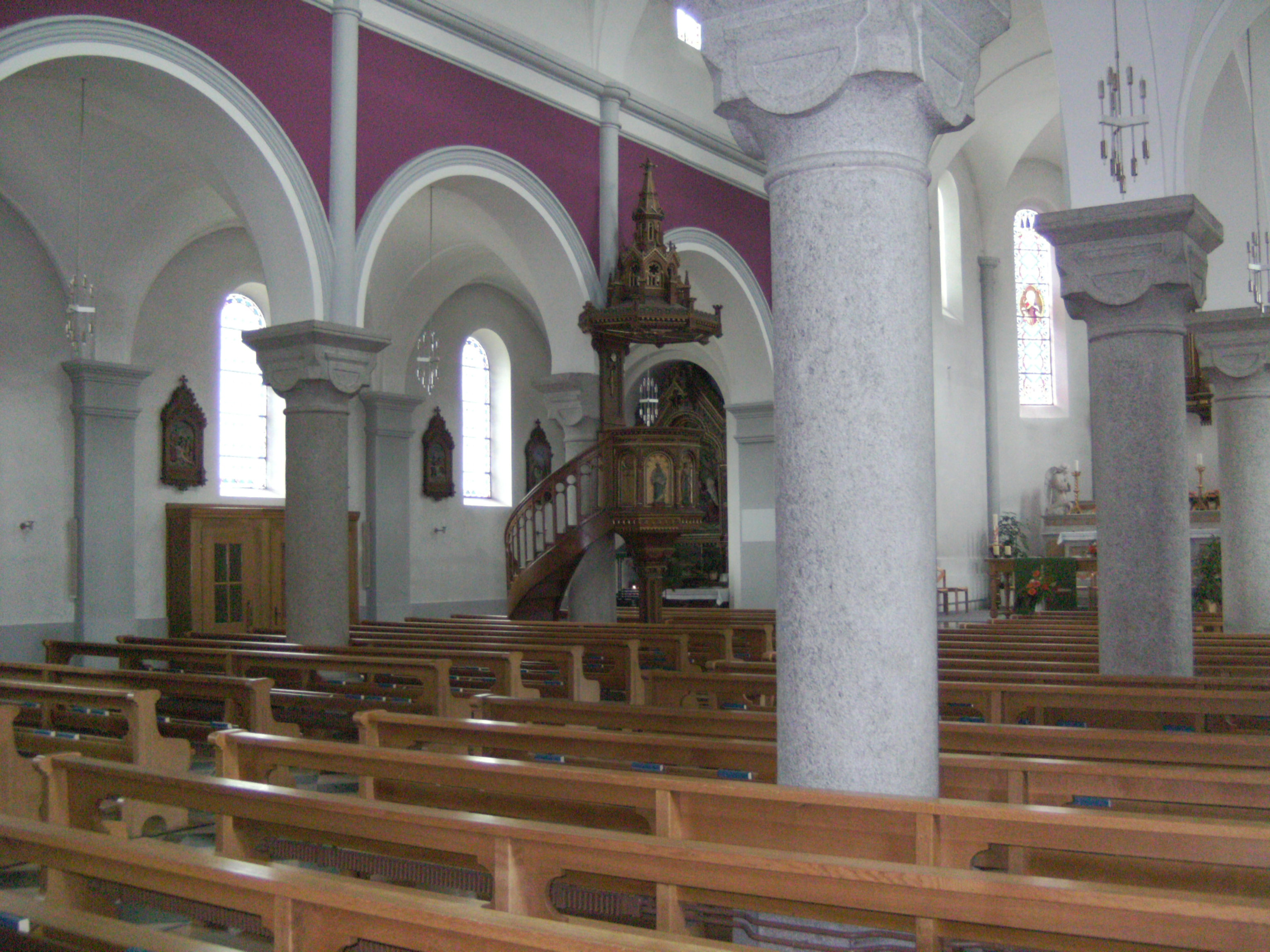 Römisch-katholische Pfarrkirche Herz-Jesu in Ried-Brig